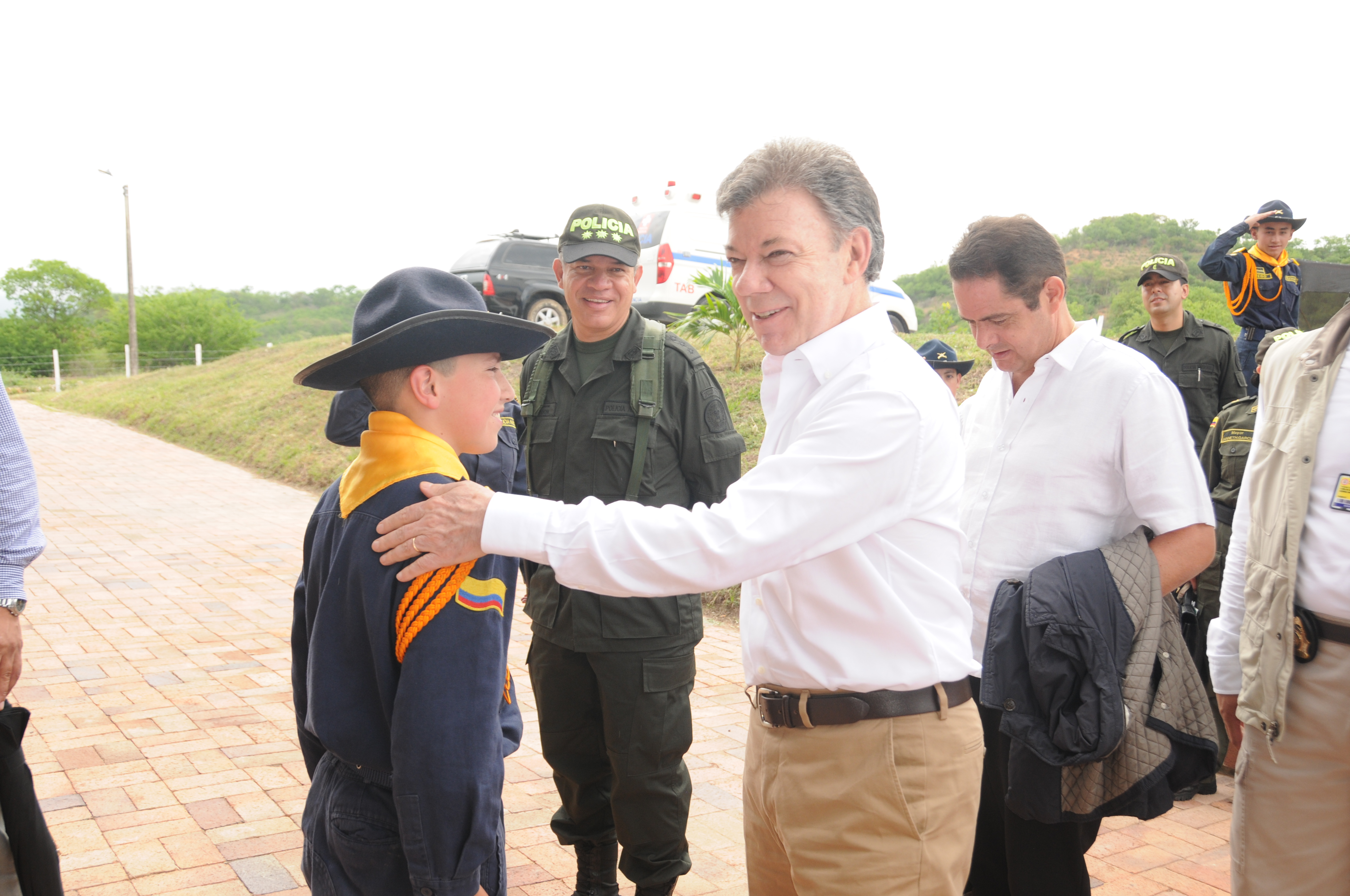 en Girardot